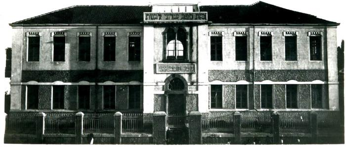 שסמינר לוינסקי היה בנווה צדק